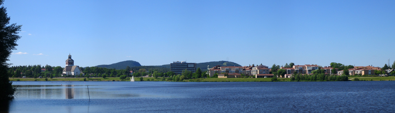 Vy över Bollnäs centrum tagen vid utloppet från Vågen.